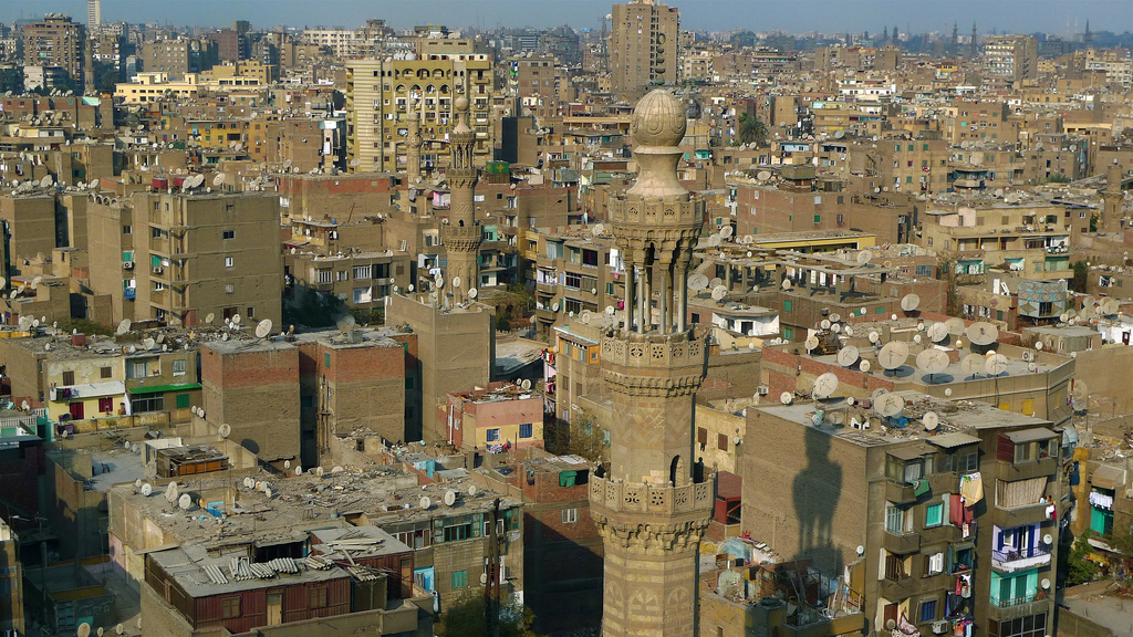 Le Caire